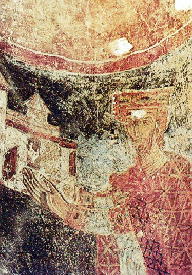 Public Domain, Bild selbst gescannt - Istroija srpskog naroda, Seite 257